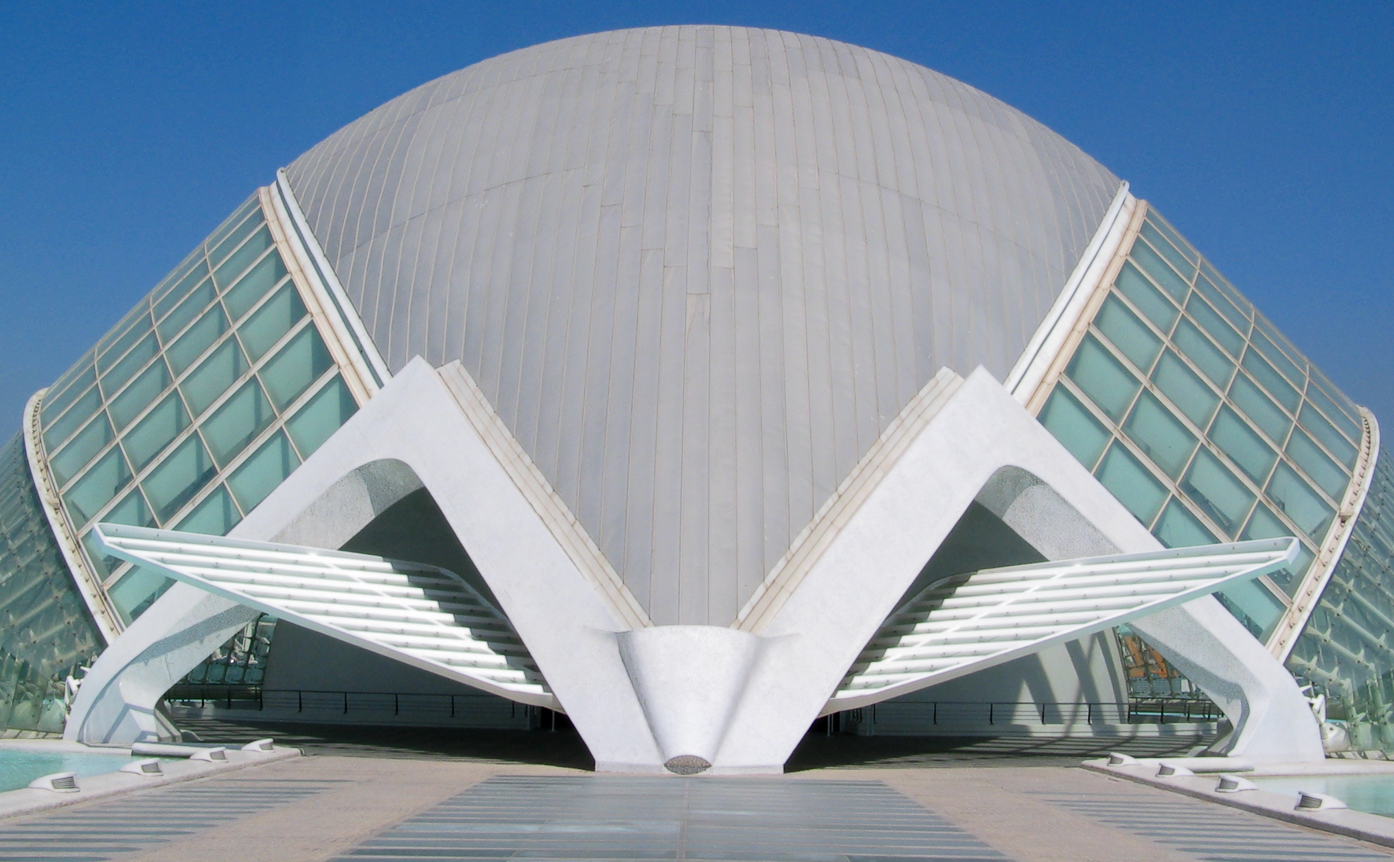 L'Hemisfèric, a 3-D Cinema in València, Spain